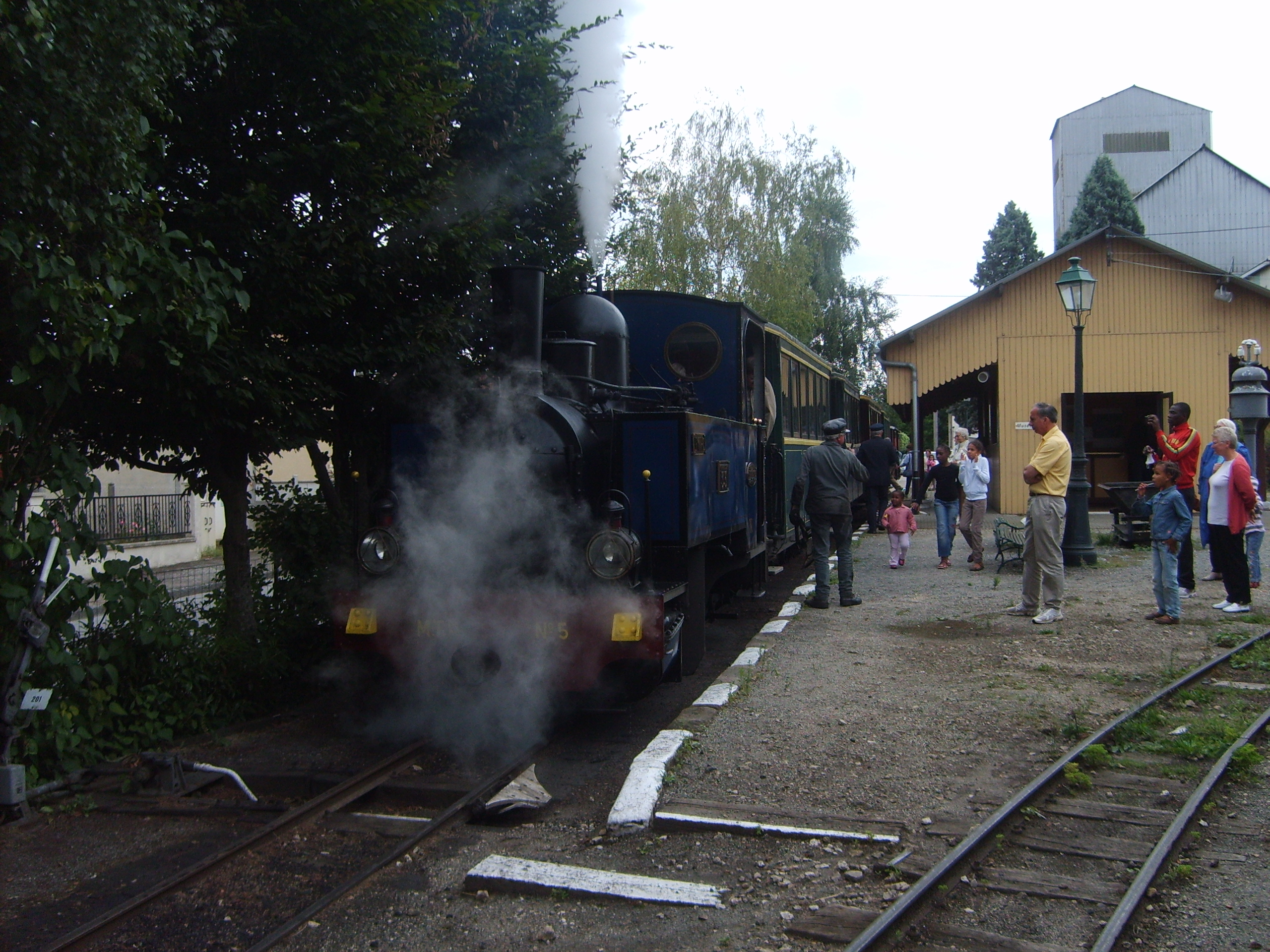 Rame du Tramway de Pithiviers à Toury au départ de la gare musée de Pithiviers